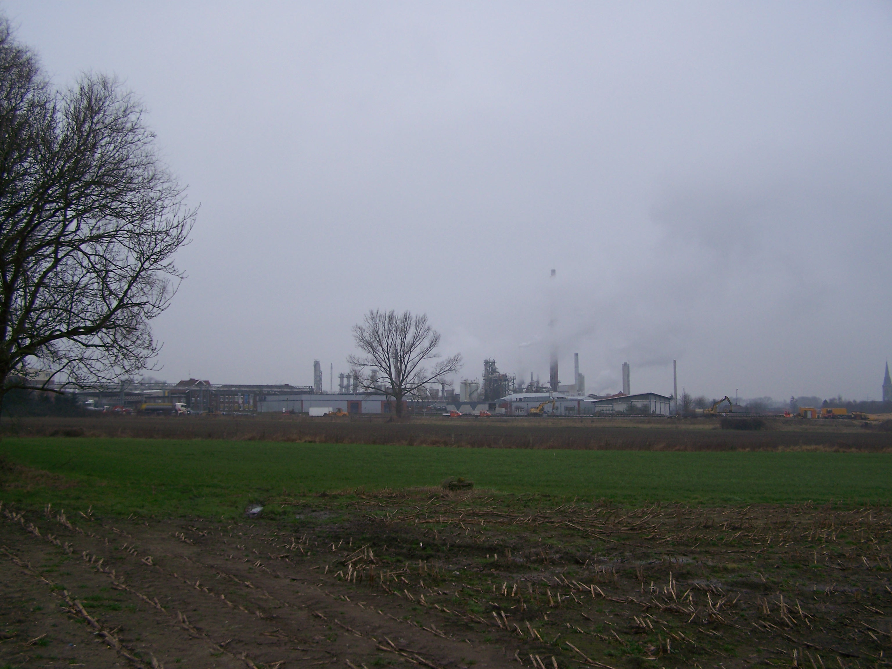 Raffinerie Salzbergen